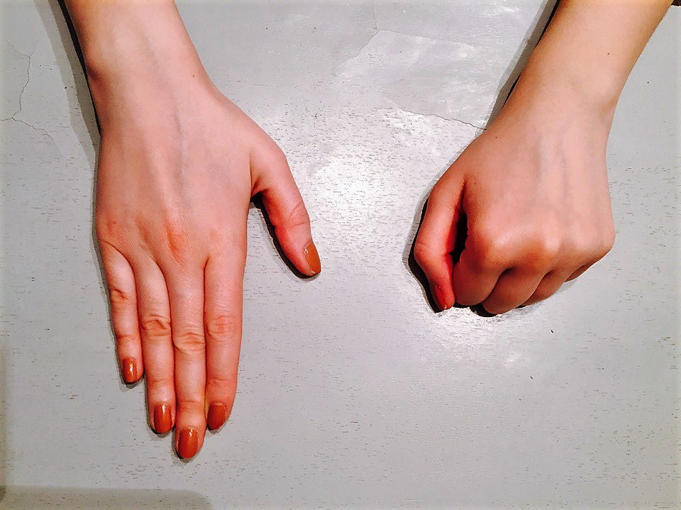 Образец выполнения пробы на реципрокную координацию рук